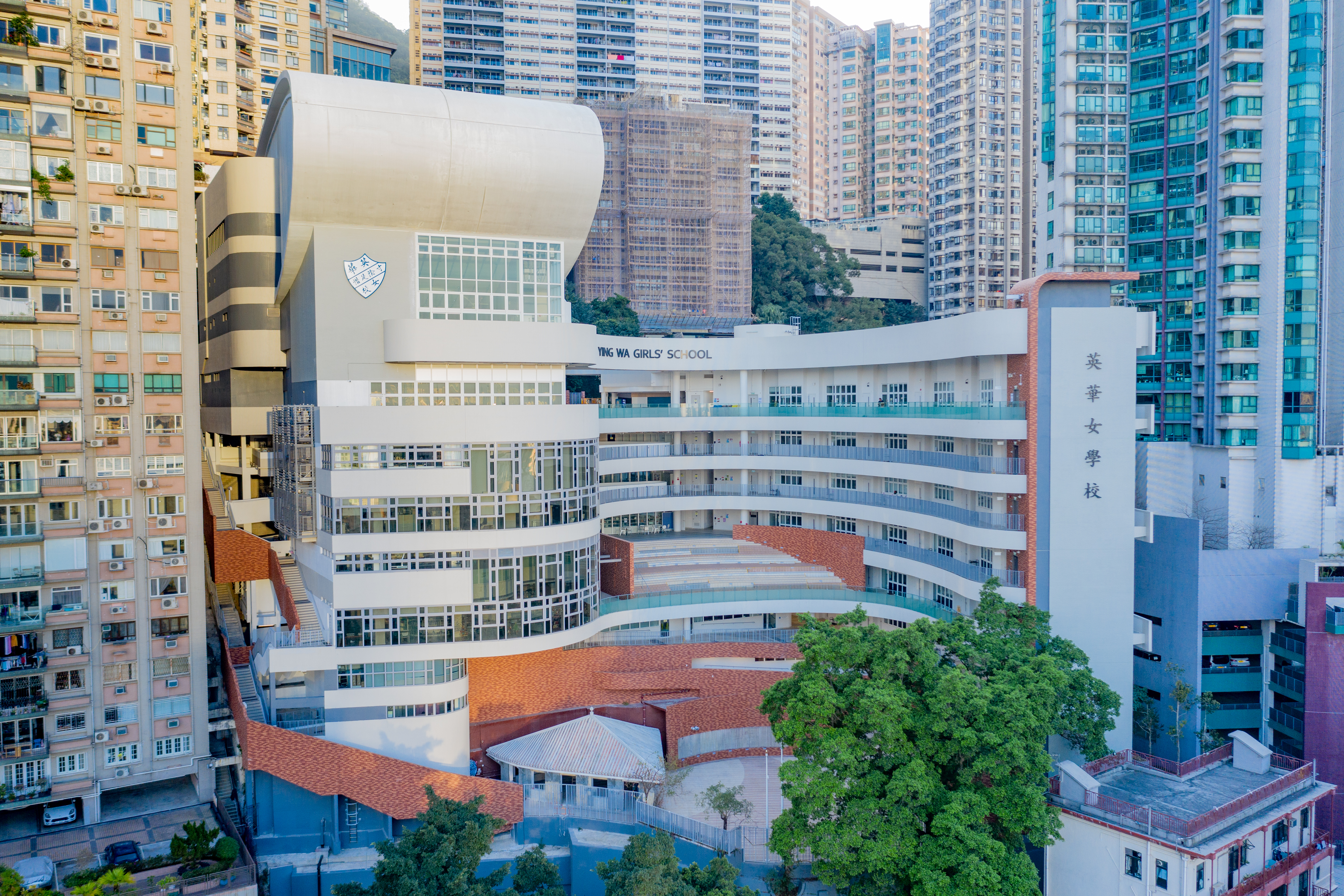 英華女學校新校舍